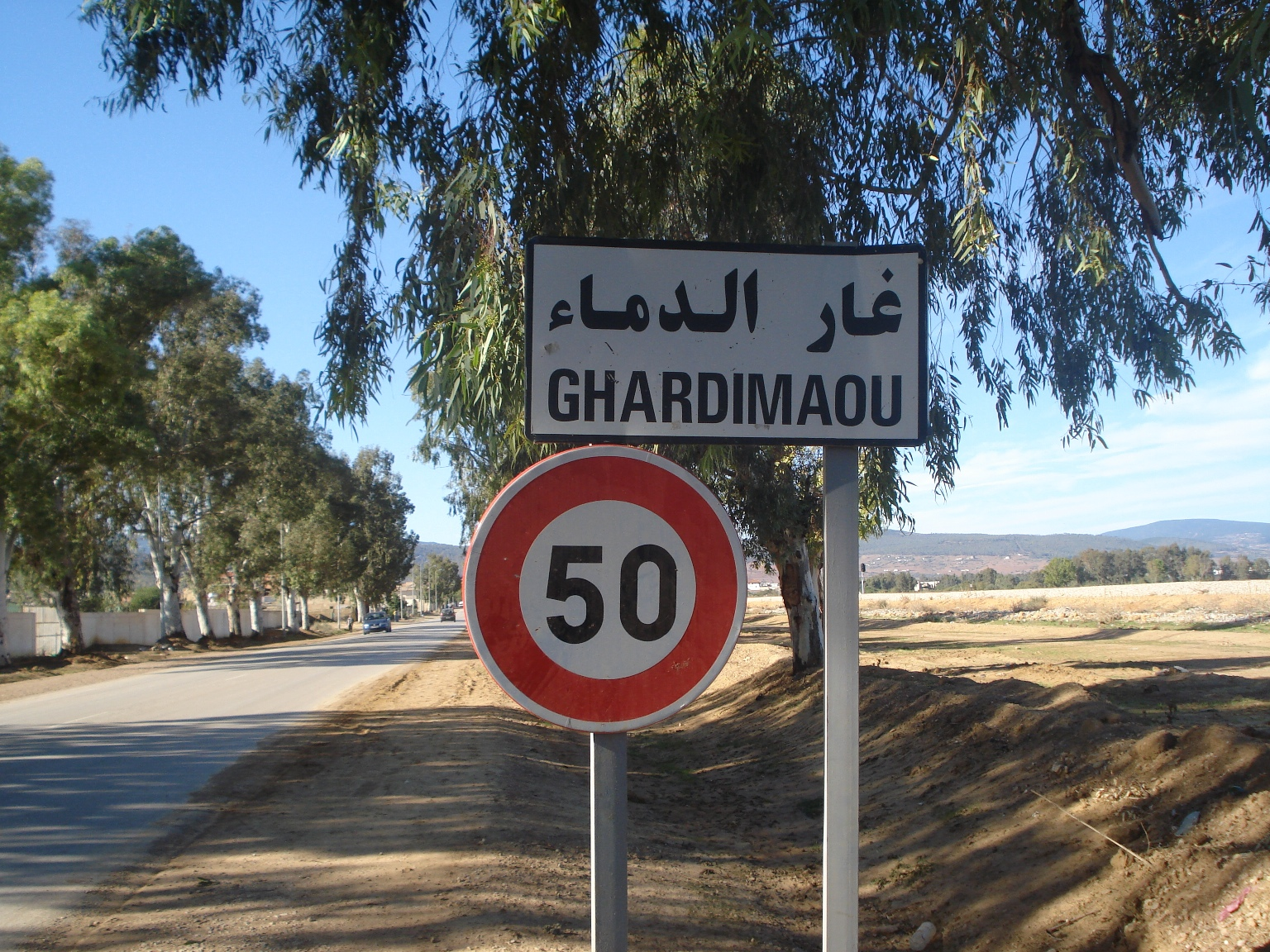 panneau de l'entrée de Ghardimaou, en arabe et en français